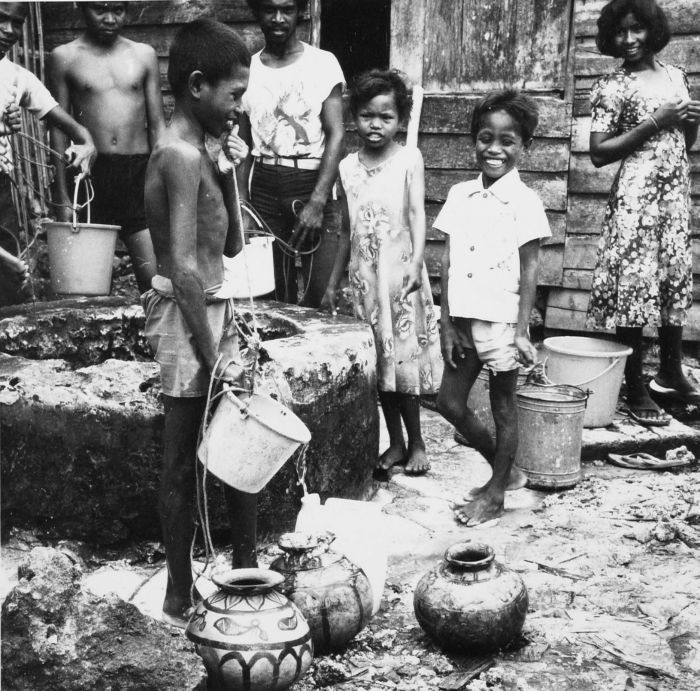 Negatief. Mensen bij de gemeenschappelijke waterput achter de markt van Tual, met op de voorgrond de voor het eiland typische kruiken